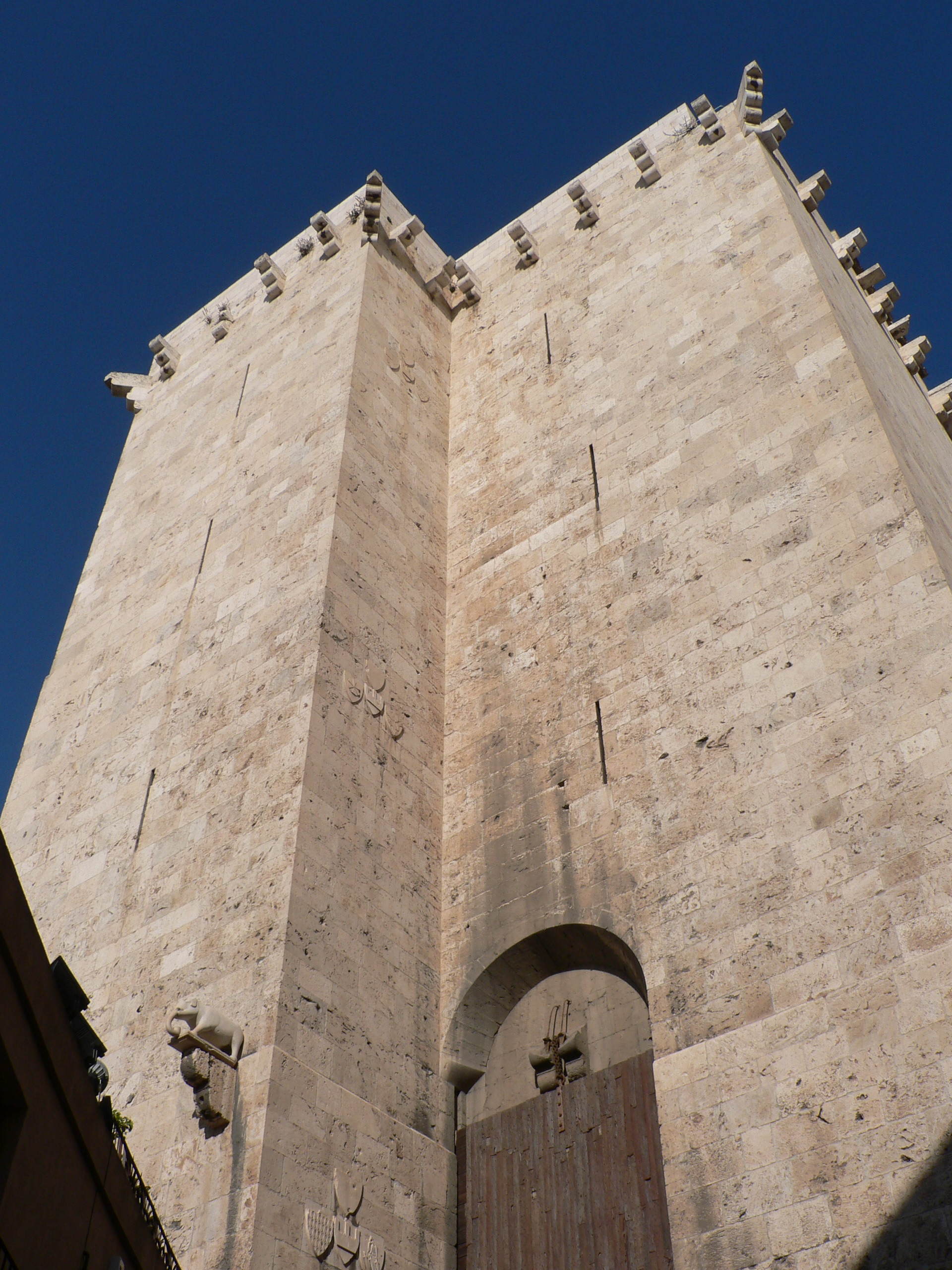 Torre dell'Elefante, Cagliari